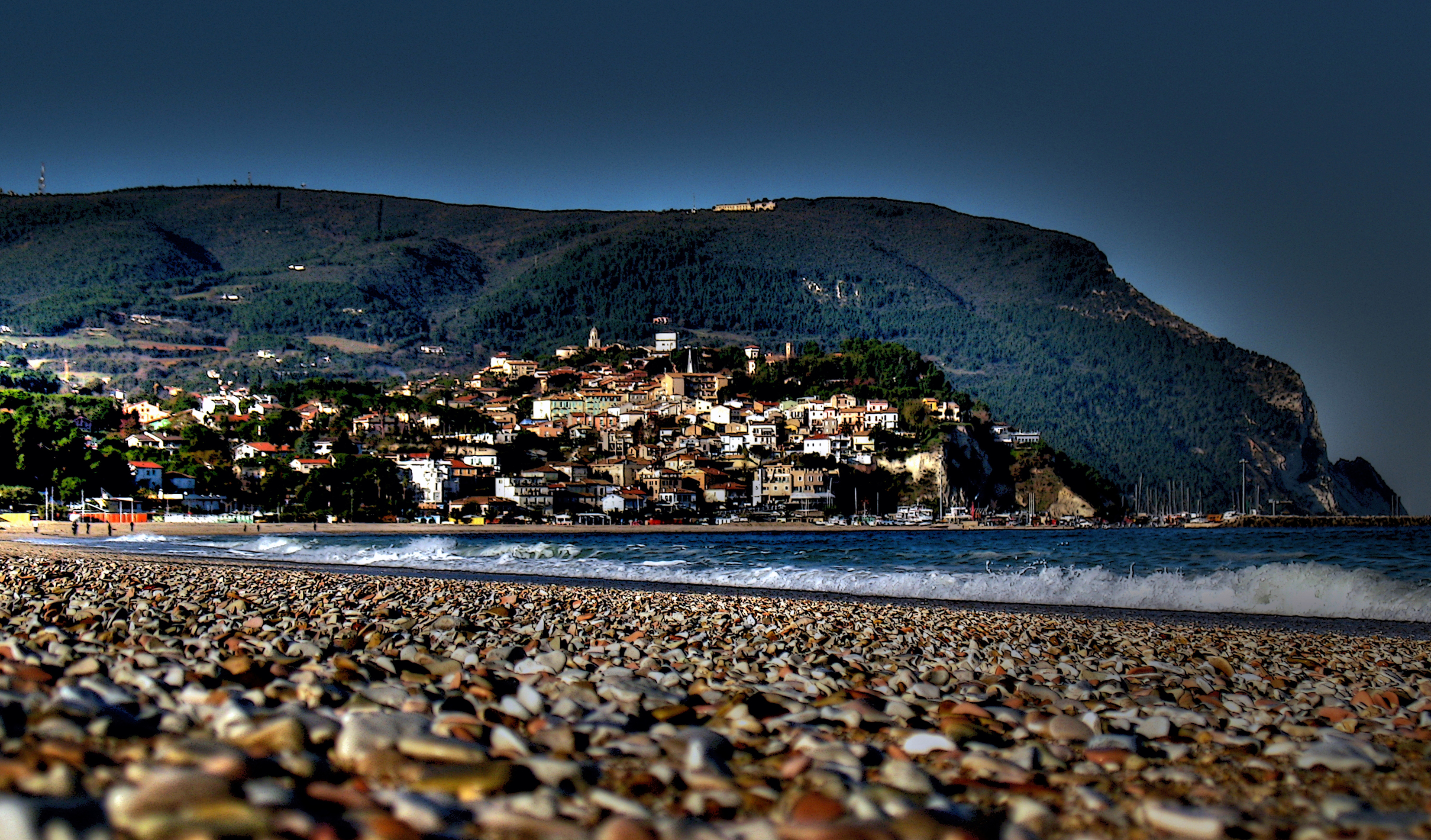 Vista del paese di Numana (Marche, Italia) dalla spiaggia, con il Monte Conero sullo sfondo.